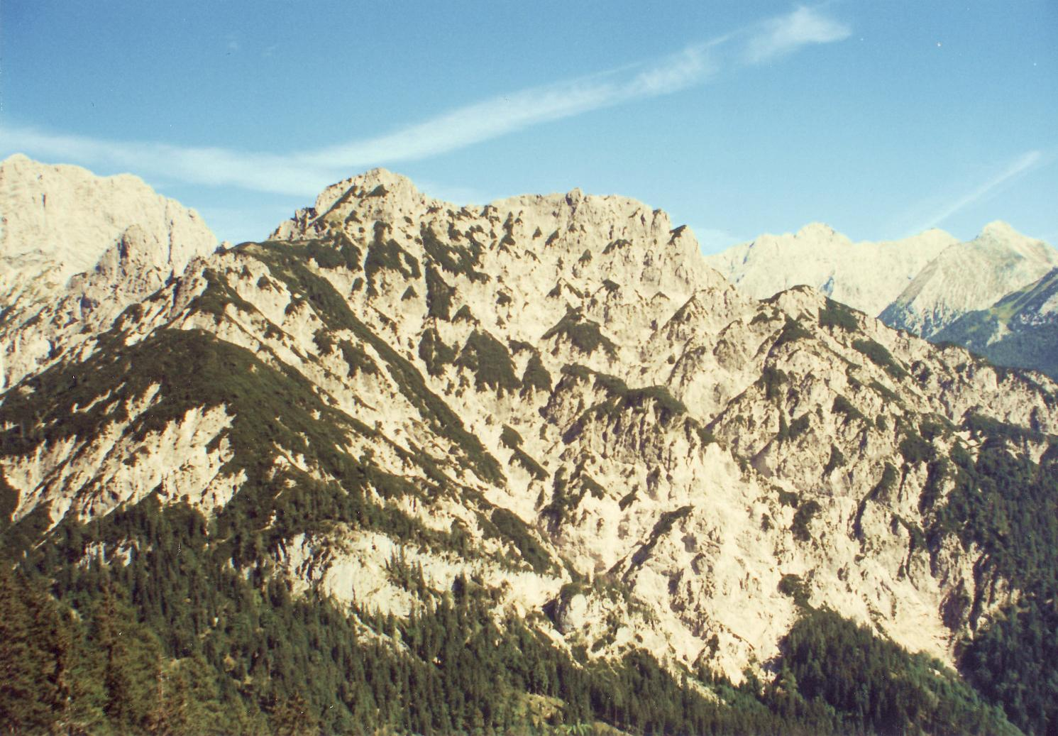 Der Ameisnockenkopf und das Gernhorn vom Großen Hundskopf aus gesehen.